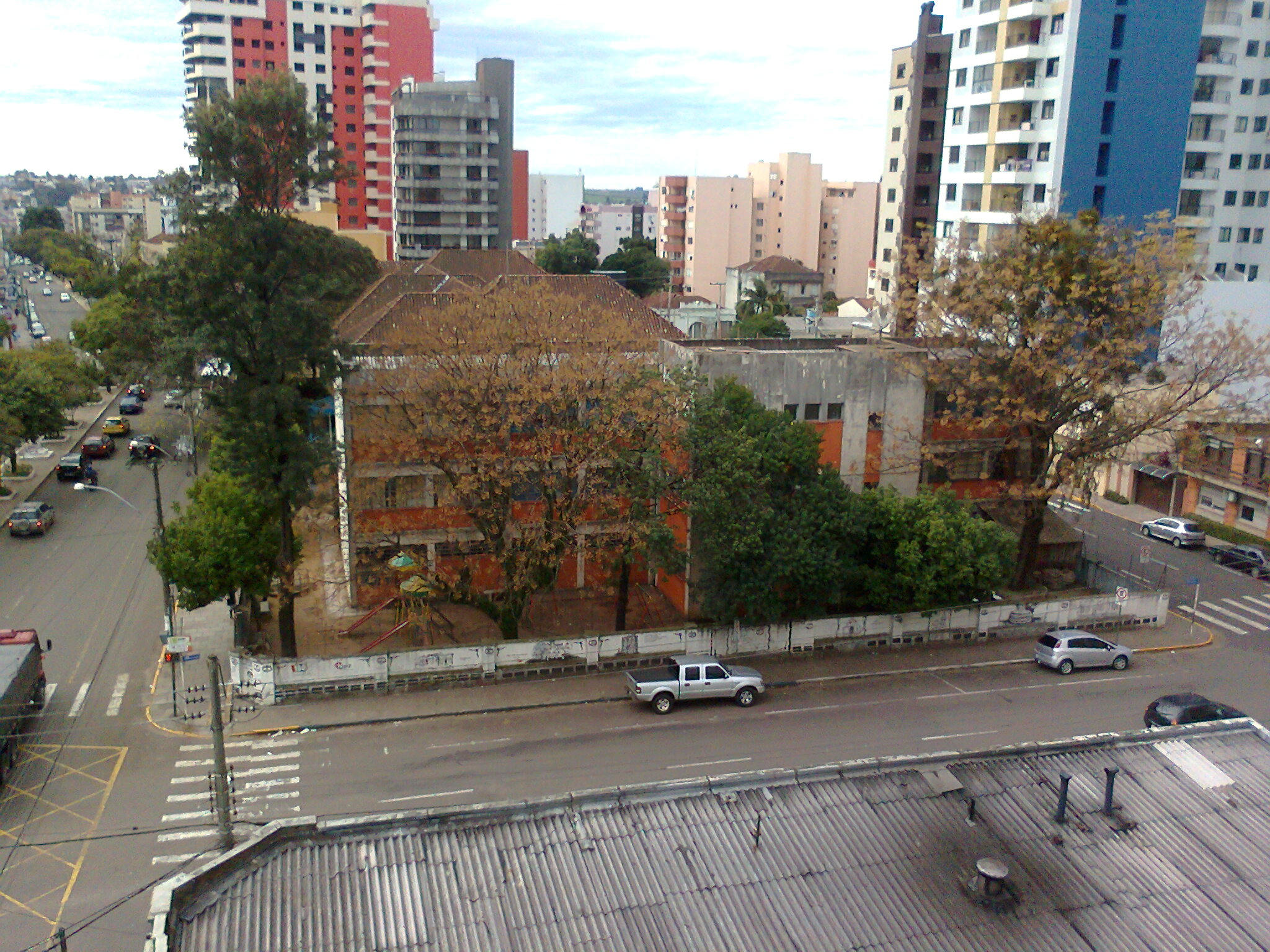 Vista da Escola Estadual de Ensino Médio Protásio Alves, em Passo Fundo, Rio Grande do Sul.